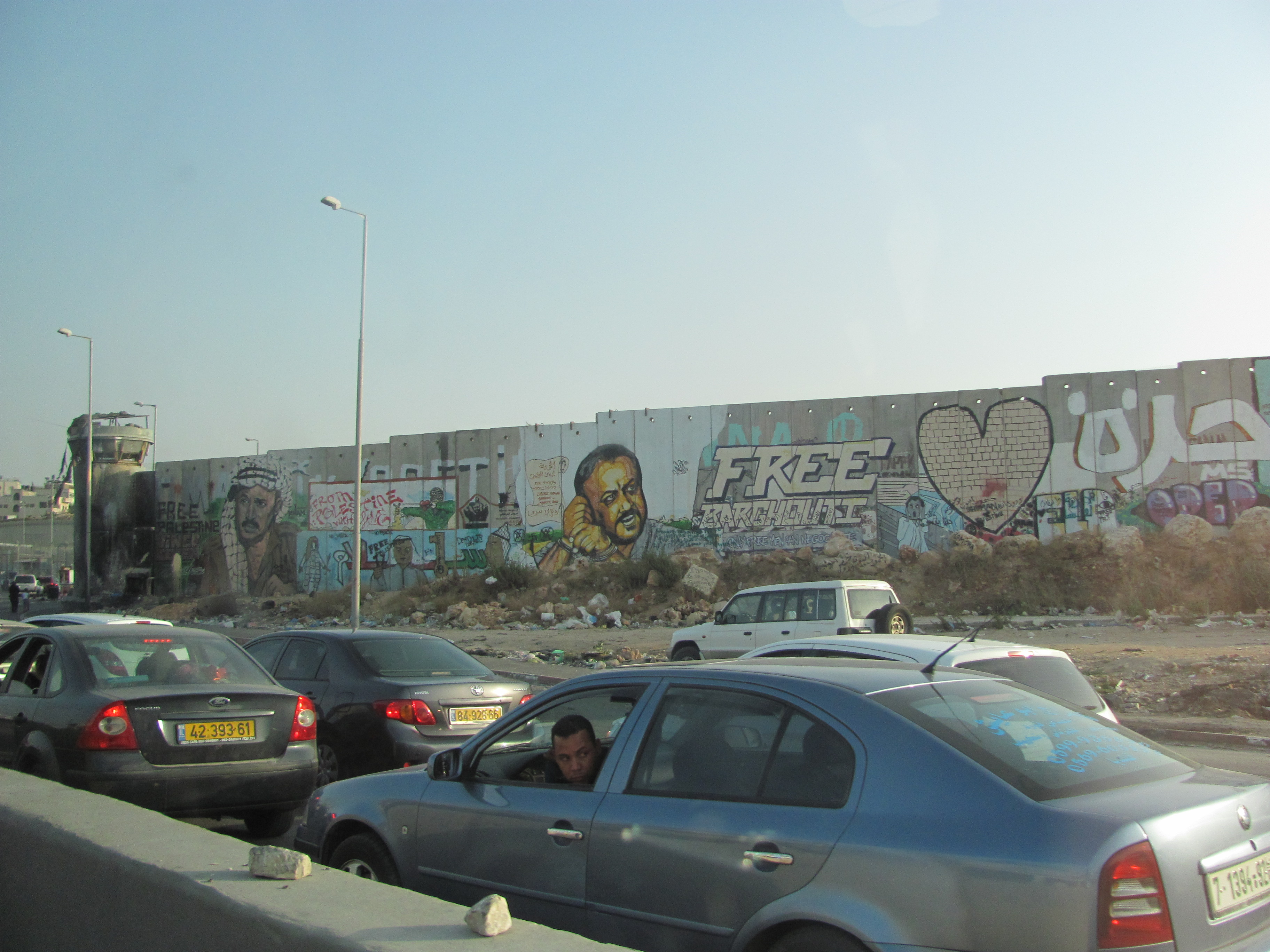 Imagen del Muro que separa Israel de los territorios Palestinos desde Ramala. Con ilustraciones de Yasser Arafat.